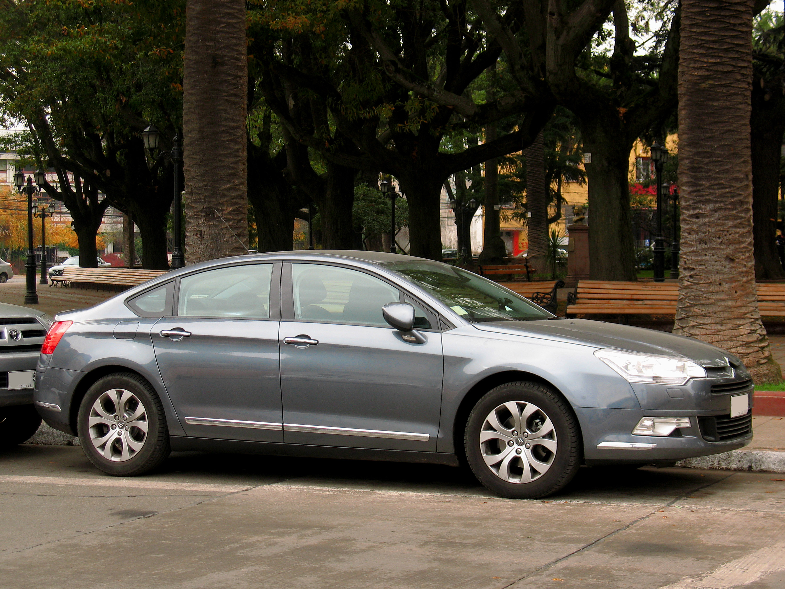 Citroen C5 2.0 2011